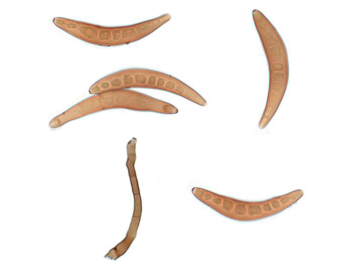 Cochliobolus heterostrophus conidia